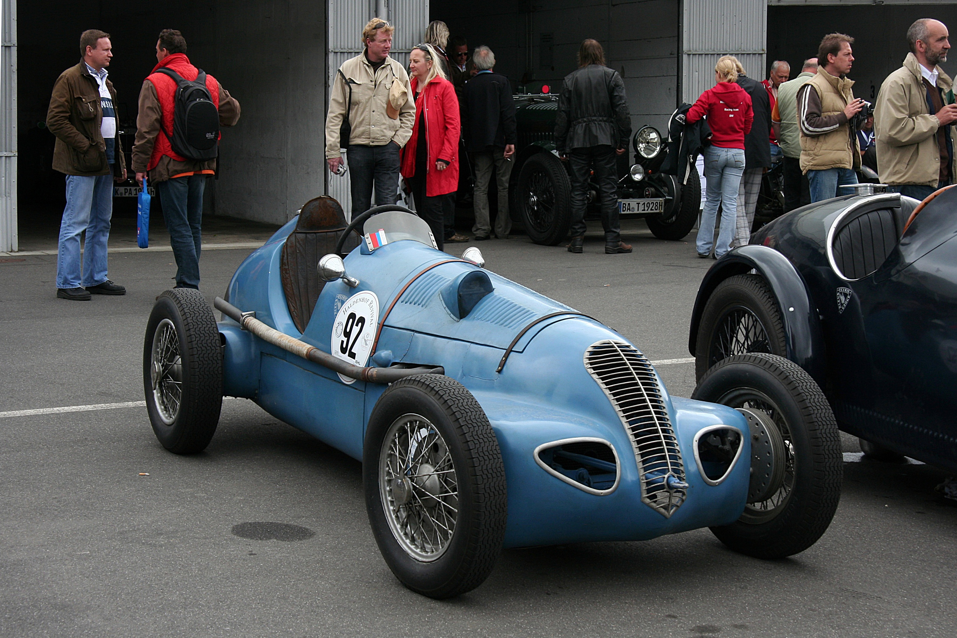 Simca Special „La Pintade“, 1300 cm³, Bj. 1934, Gordini-Motor, beim Oldtimer Festival des DAMC im historischen Fahrerlager des Nürburgrings. Nach dem Buch „Die schnellen Zwanzigerjahre …“, ISBN 3-98094-09-2-6, baute ein Fernand Venot das Fahrzeug 1933 oder 1934 als Zweisitzer aus Teilen von verschiedenen Herstellern zusammen. Kurze Zeit später wurde es zum Monoposto umgerüstet. Seine in etwa heutige Form erhielt der Wagen 1945, als der Rennfahrer Theo Martin einen Simca-Deho-Motor, ein Fiat-Getriebe und eine vordere Doppelfederachse einbaute. Außerdem bekam er eine leichte Aluminiumkarosserie und einen verkleideten Boden; die Bremsen und die Bugatti-Hinterachse blieben unverändert. Nach 1952 wurde das Auto verschrottet und ab 1979 wieder aufgebaut. Den Namen „La Pintade“ oder „Das Perlhuhn“ gab ihm sein Urheber, der Geflügelzüchter gewesen sein soll.